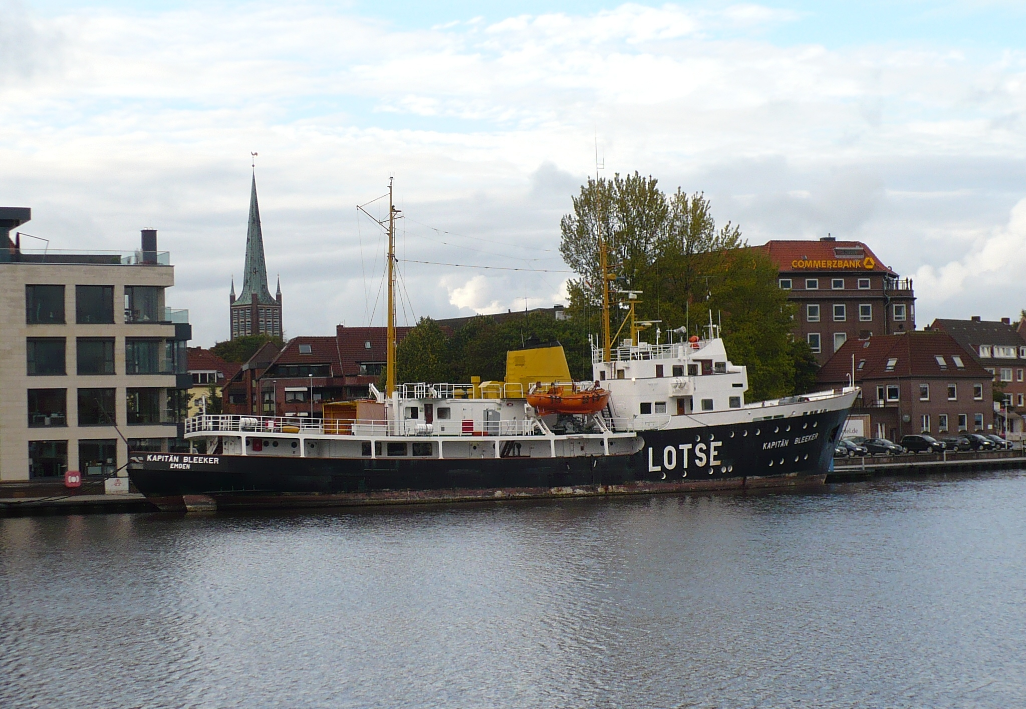 Lotsenstationsschiff Kapitän Bleeker im Emder Hafen im September 2012